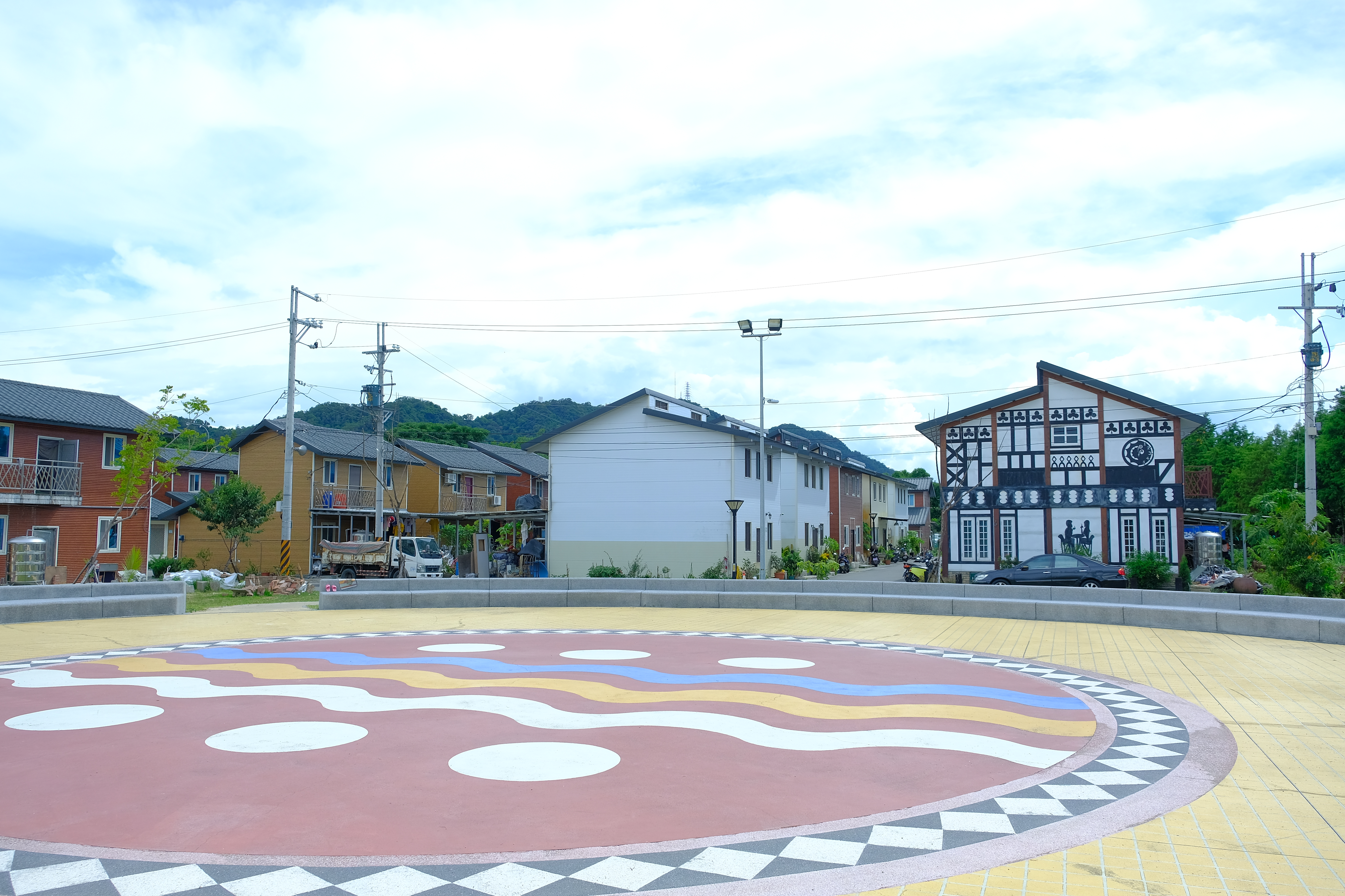 中文（台灣）: 2020 Sanying Community 三鶯部落自力造屋於三峽原住民生活園區